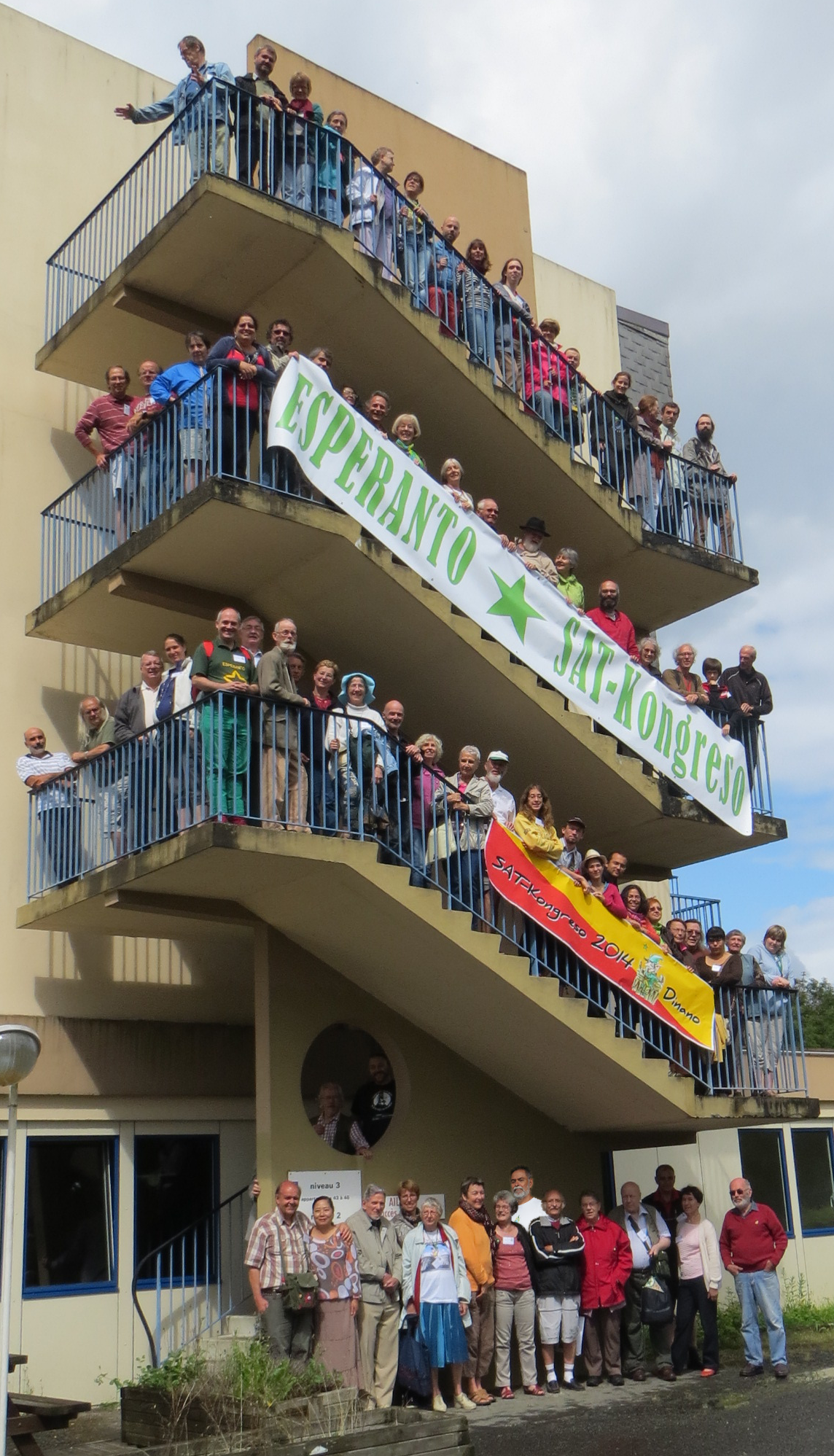 Foto de SAT-kongreso 2014 en Dinano, kun munta aldono de la fotinto.